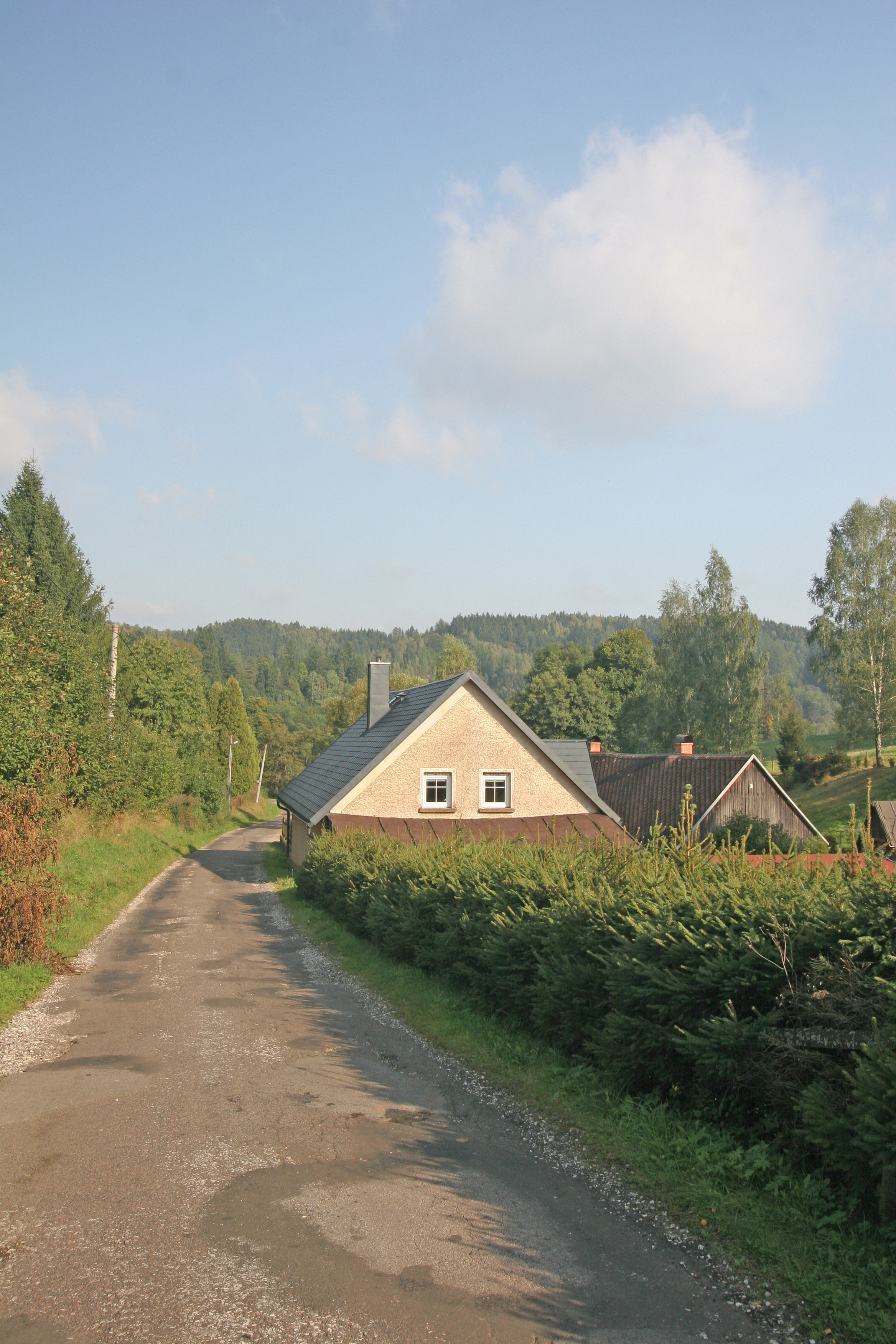 Libeč čp. 9 ?